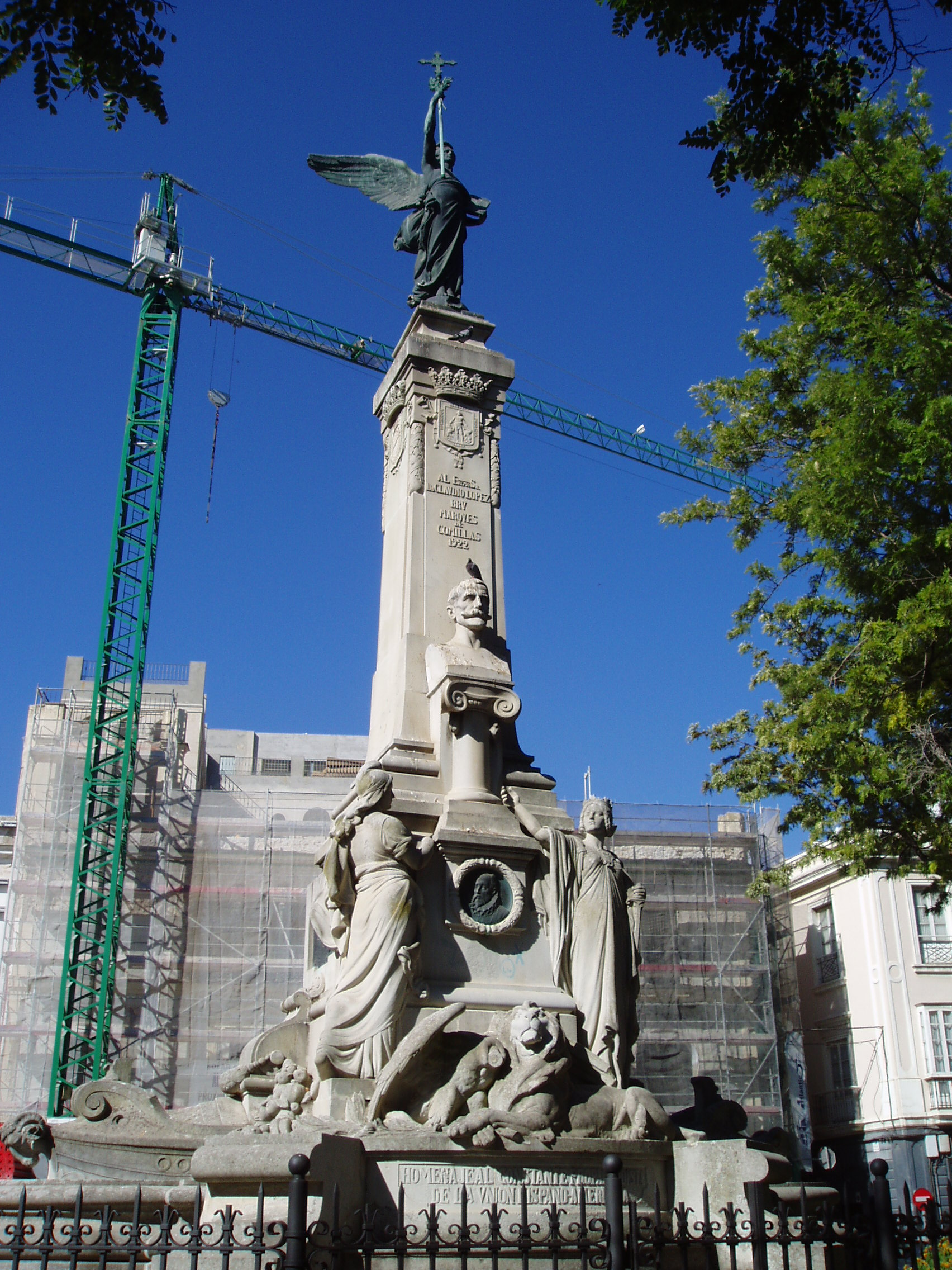 Monumento al Marqués de Comillas en Cádiz, España.